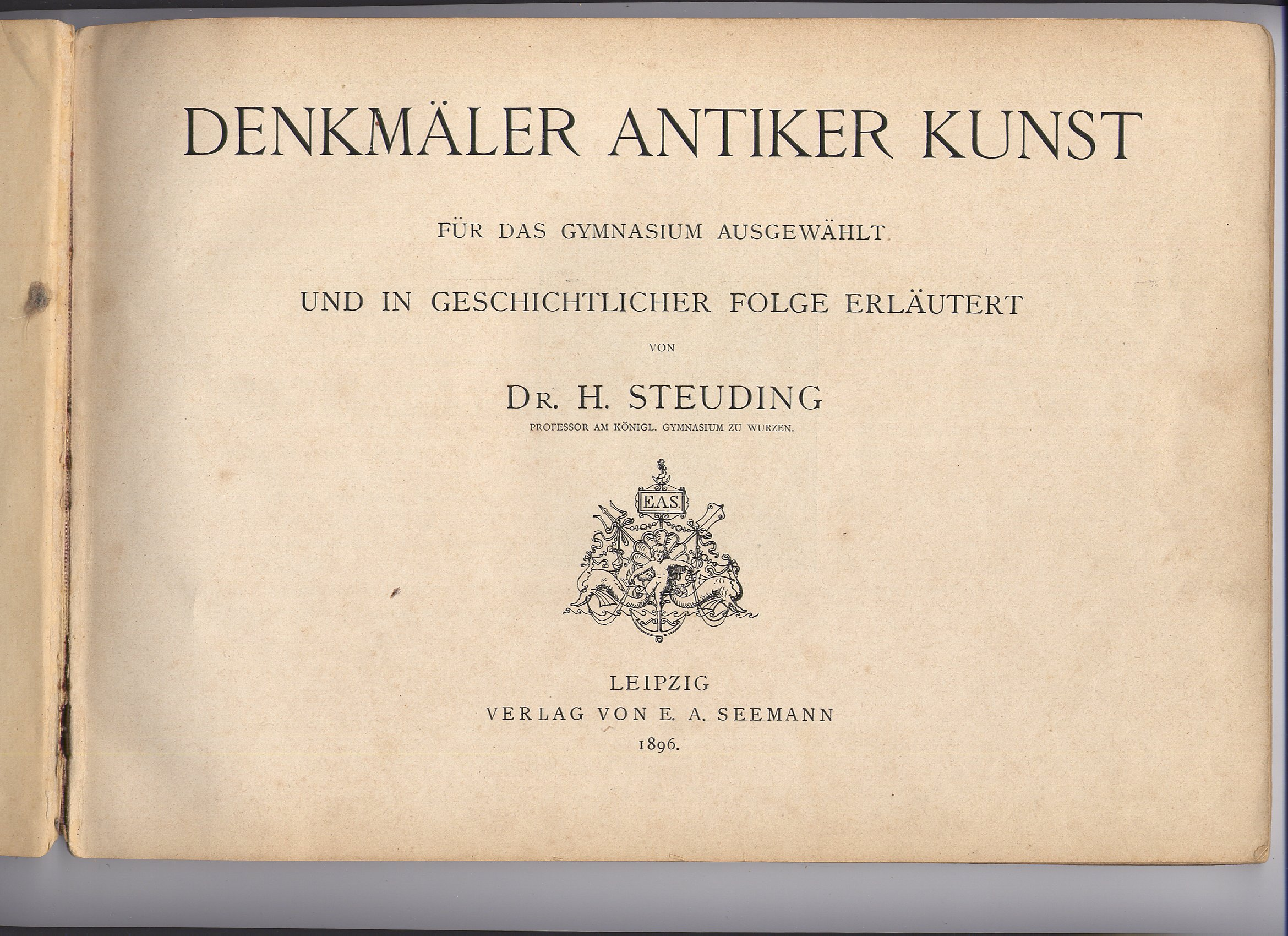 Titelseite des Buches "Denkmäler antiker Kunst"